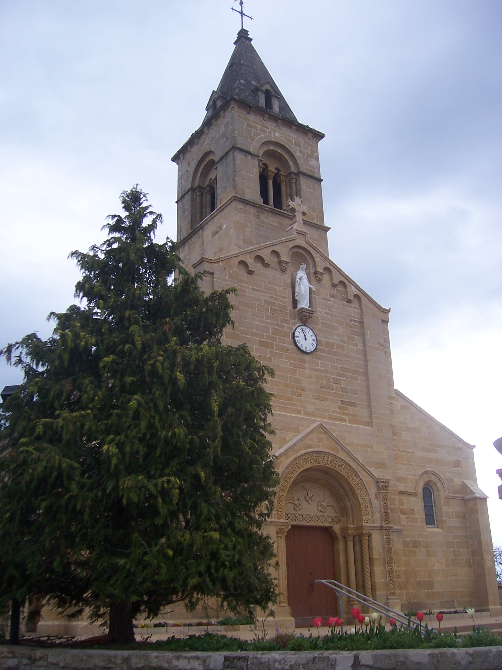 Eglise de Tancon